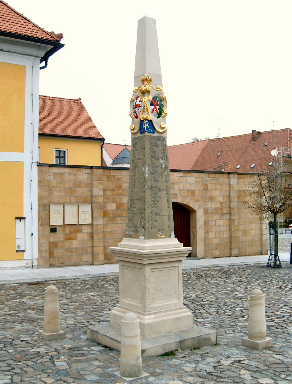 Postmeilensäule auf dem Markt von Neustadt in Sachsen